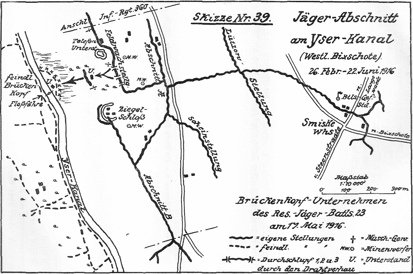 Brückenkopf-Unternehmen des Res.-Jäger-Batls 23 am 17. Mai 1916